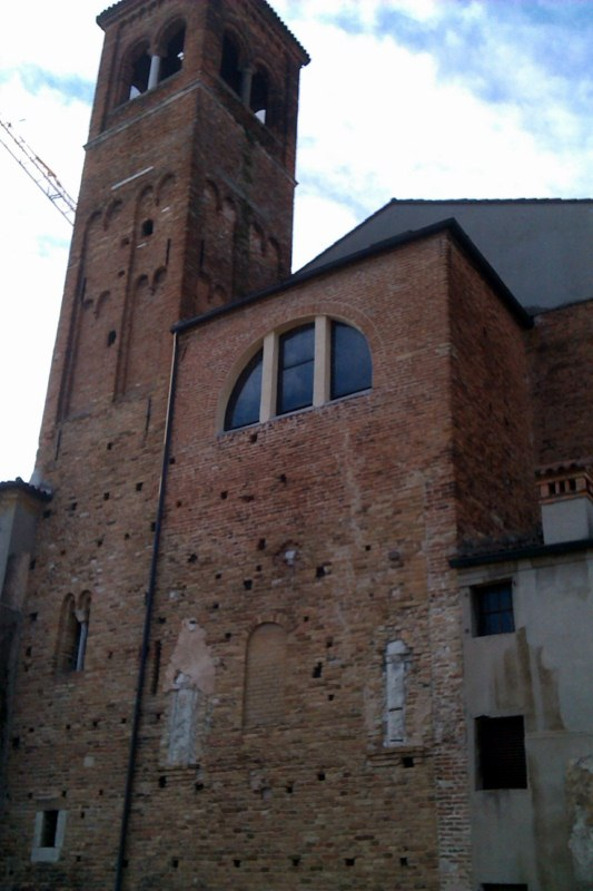 Abside chiesa degli Ognissanti a Padova.